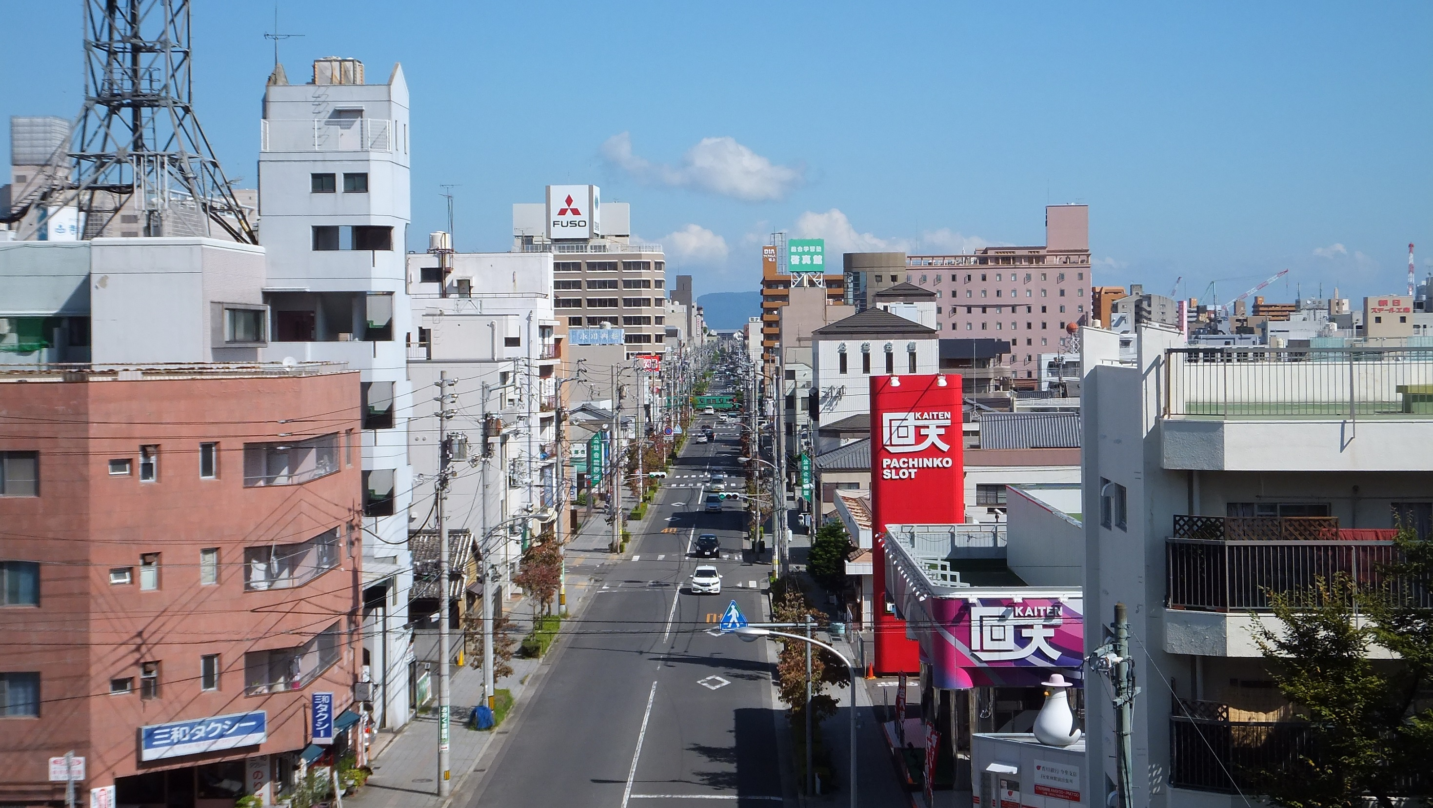 JR高徳線・栗林駅から見た高松市街 （2015年）琴電長尾線電車が通過中